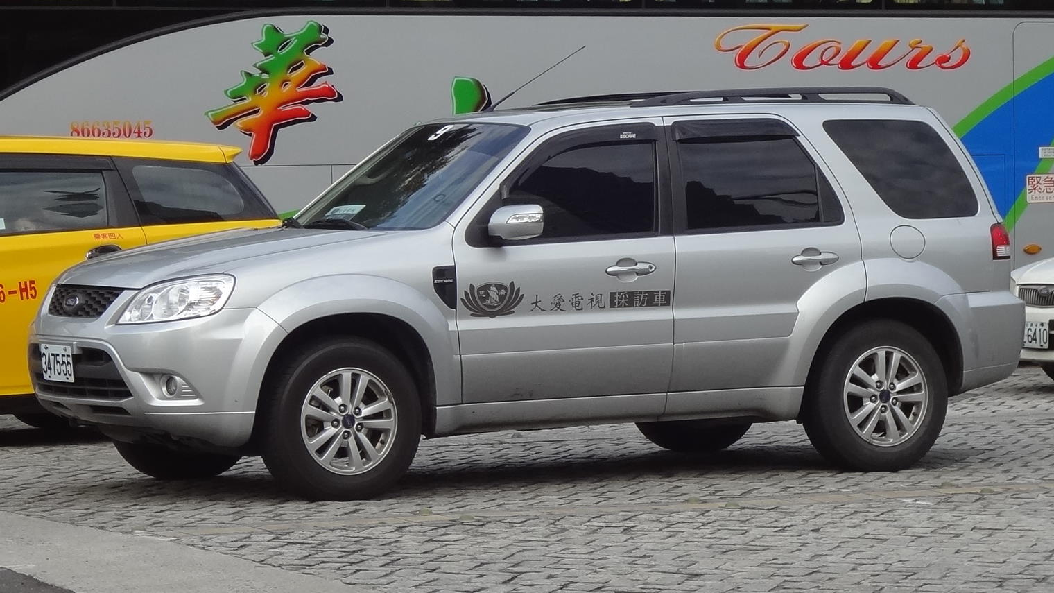 大愛電視採訪車3475-55，車型為福特Escape。